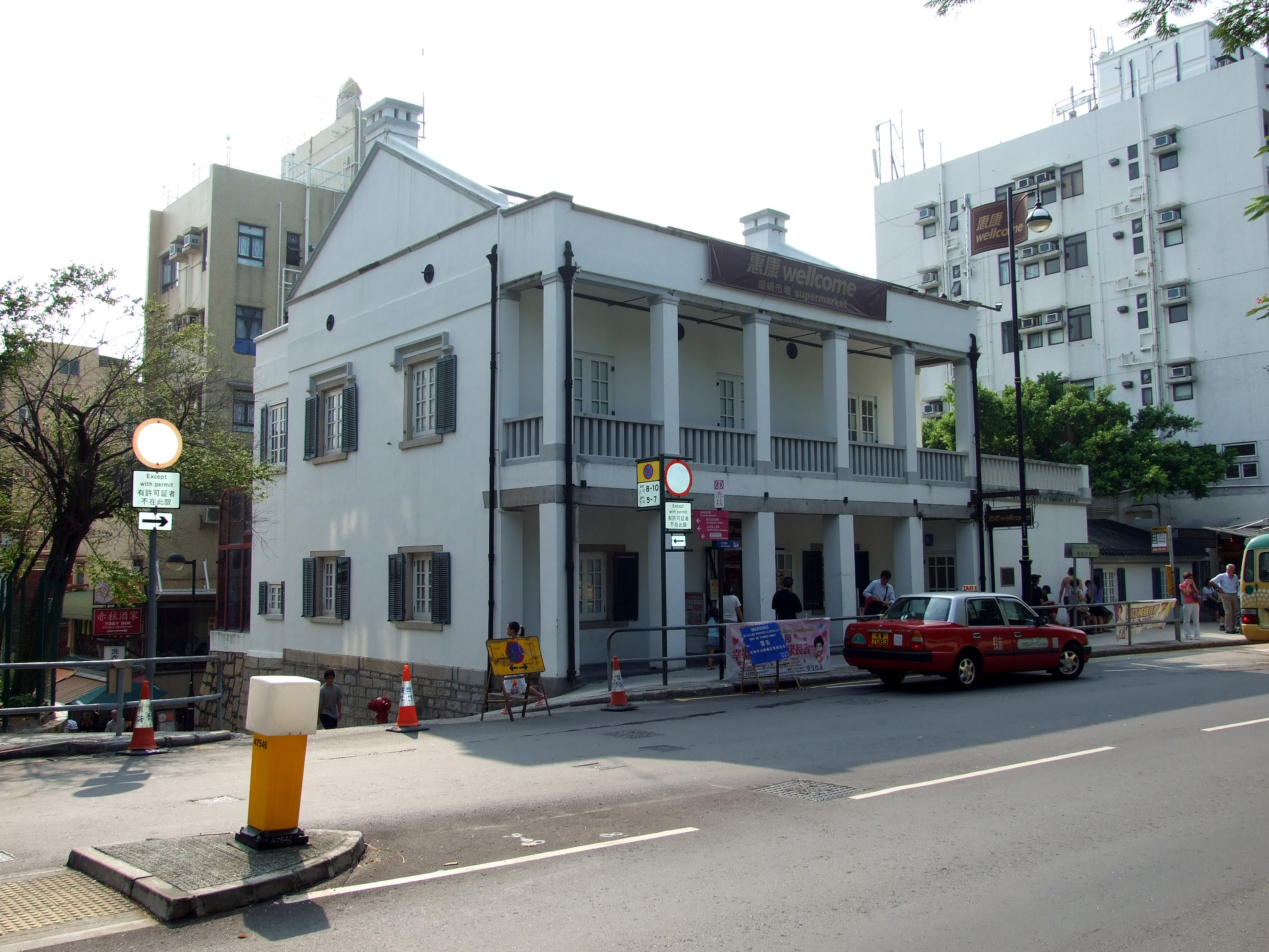 中文（香港）: 舊赤柱警署